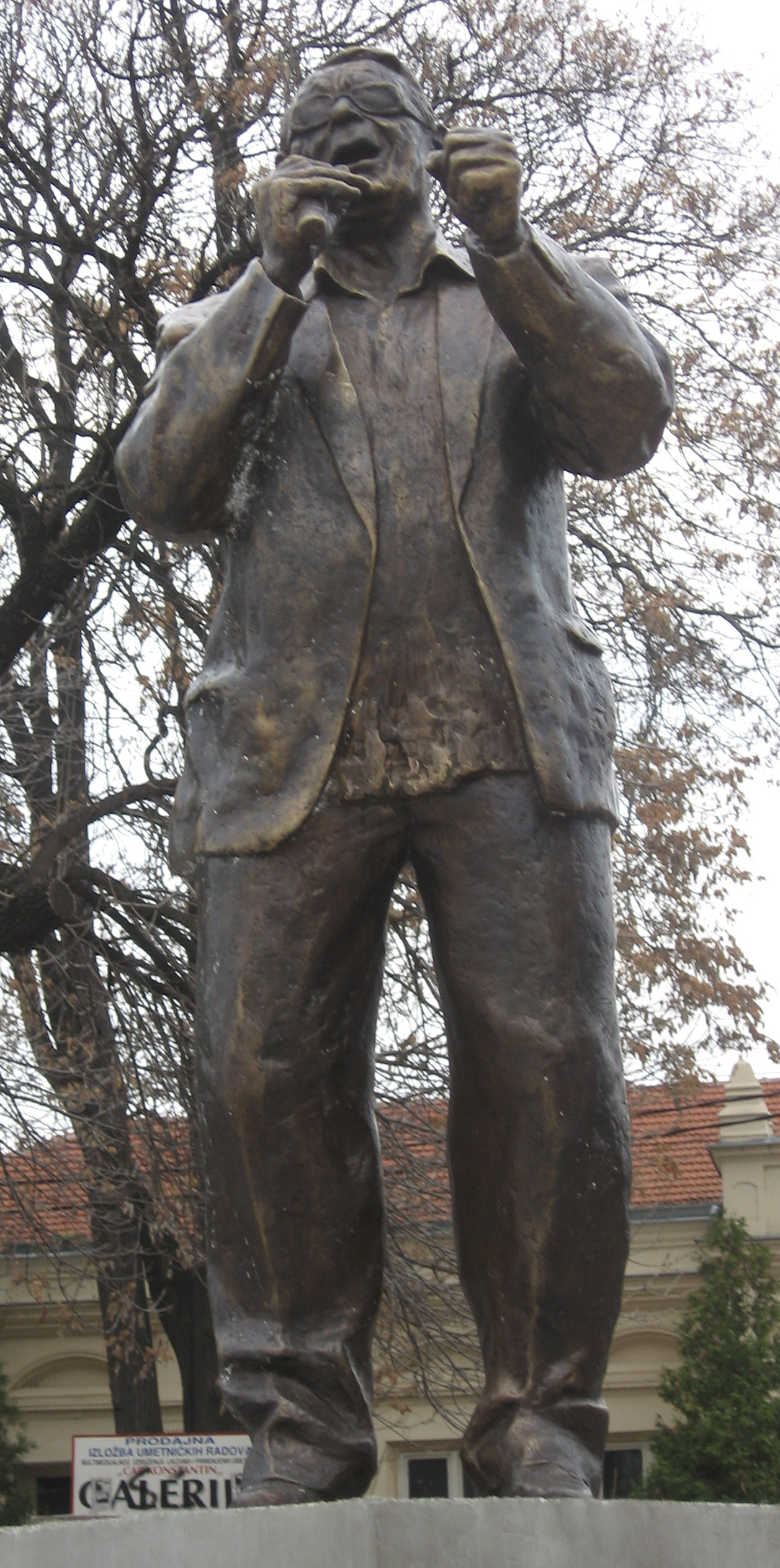 Споменик Шабану Бајрамовићу у Нишу, откривен 12. августа 2010.